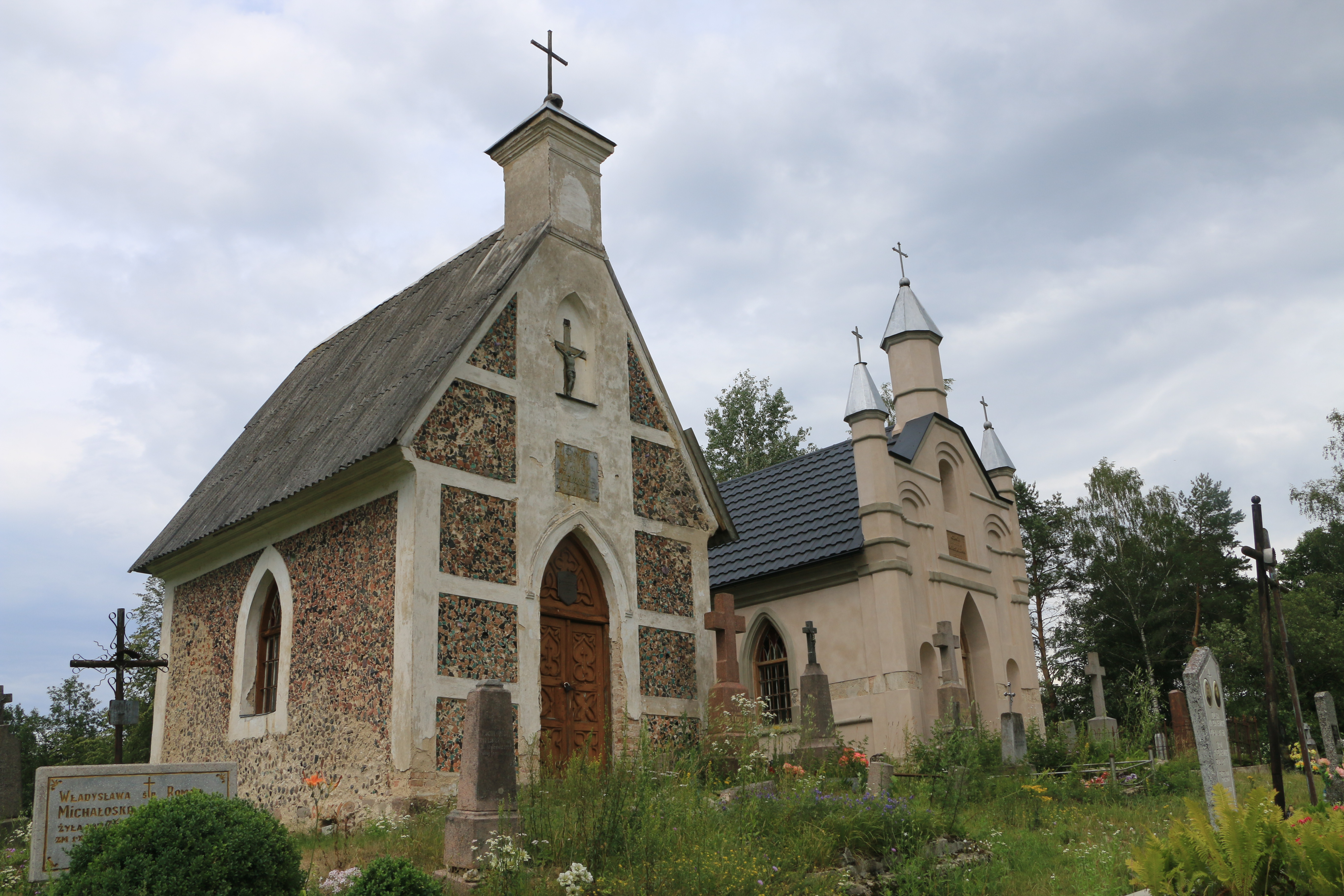 Grodna District, Belarus